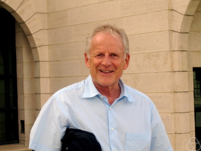 Bruno Buchberger 2005 in Zanjan (Iran)